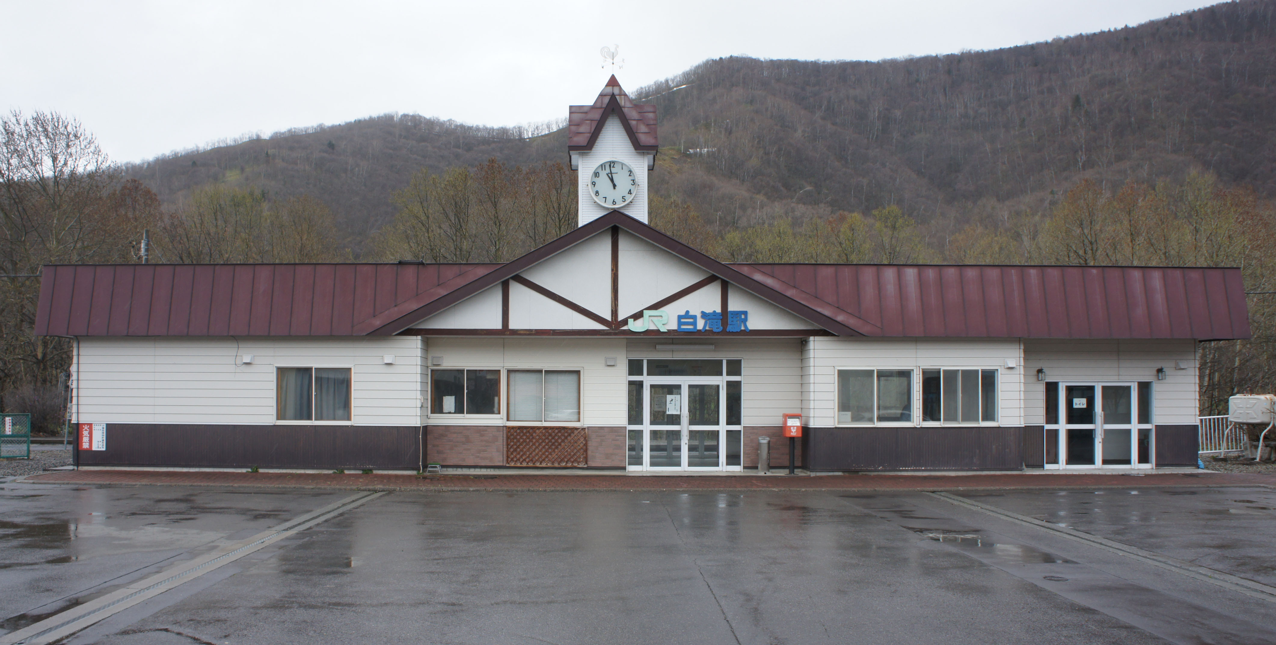 JR石北本線・白滝駅の駅舎